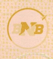 Antiga logomarca do Banco do Nordeste do Brasil utilizada até fins da década de 1960.